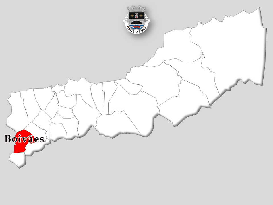 Censos 1864/2011